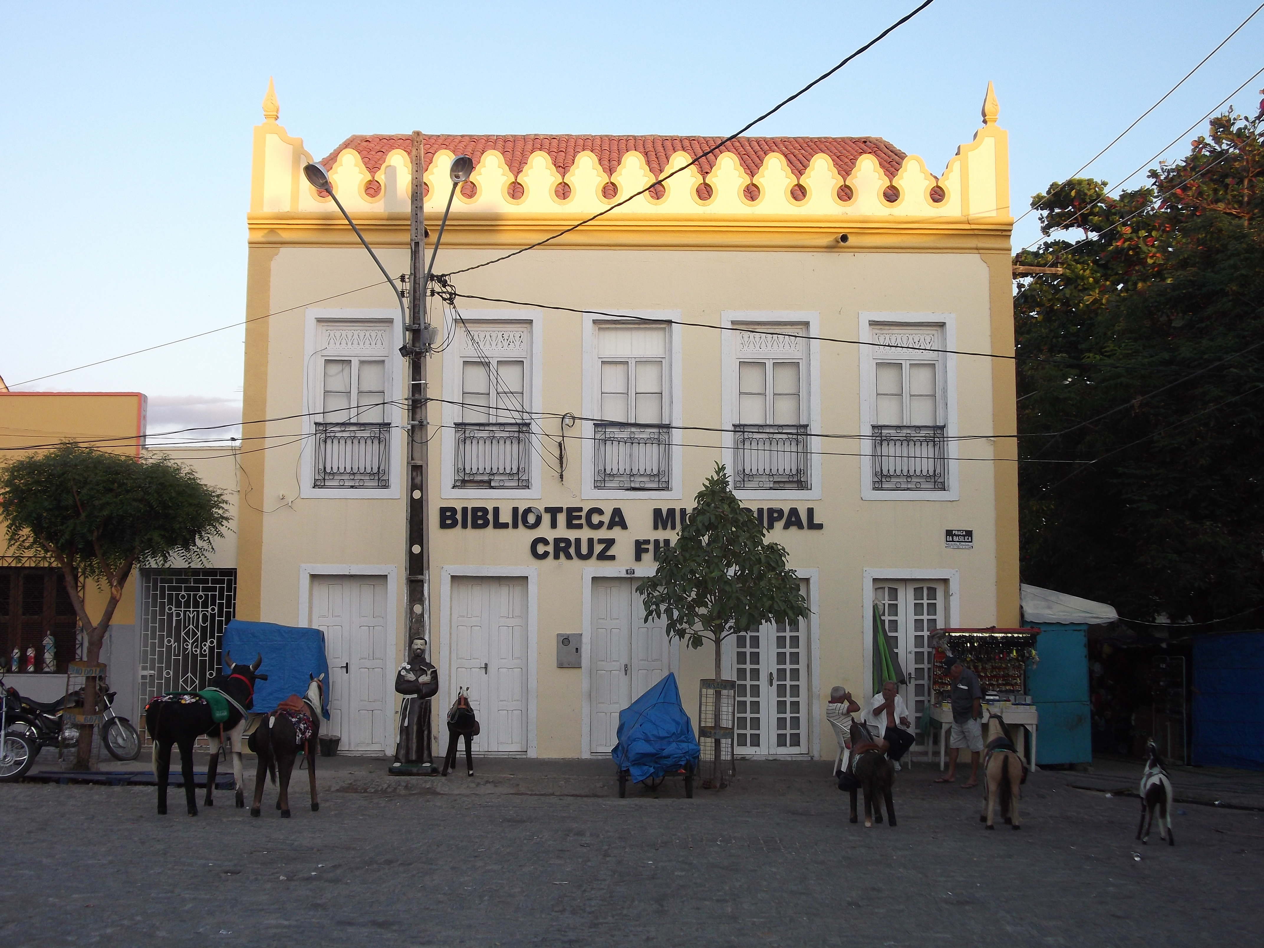 Biblioteca Municipal Cruz Filho, Canindé, Ceará, Brasil